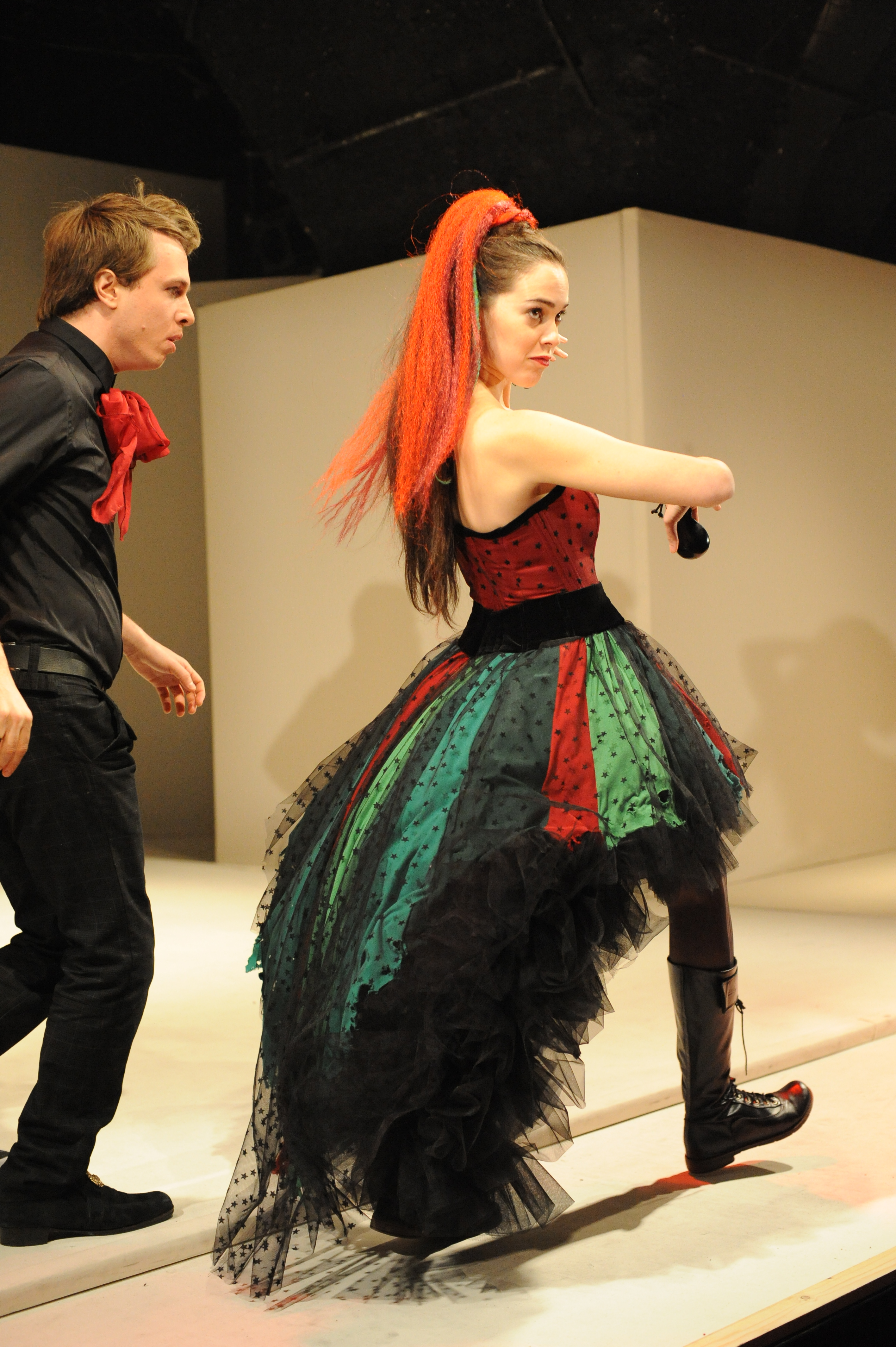 נילי רוגל ואודי רוטשילד ב"תעלולי סקפן", בבימויו של אודי בן-משה, תיאטרון החאן, 2010